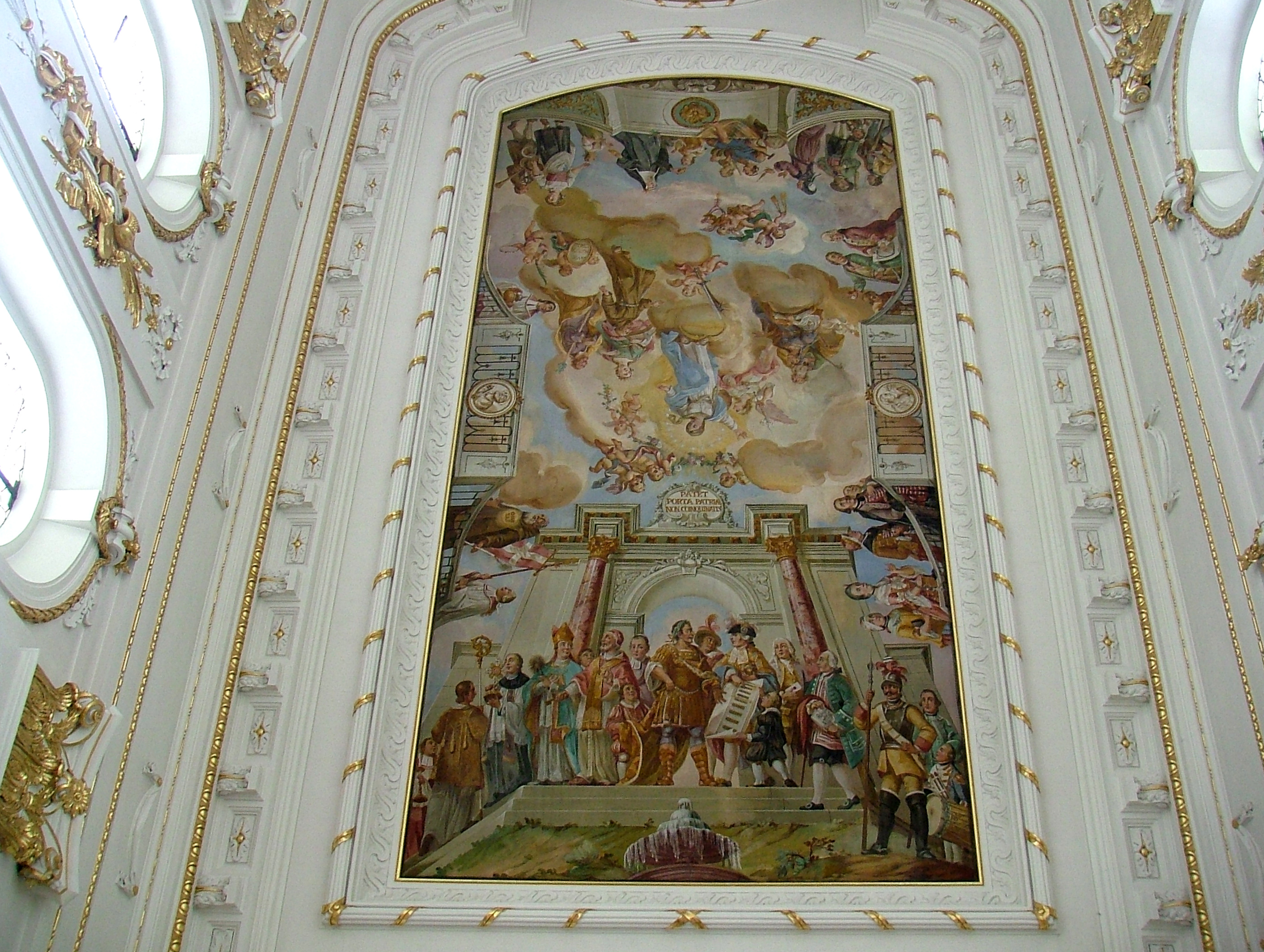 Früher Klassizismus